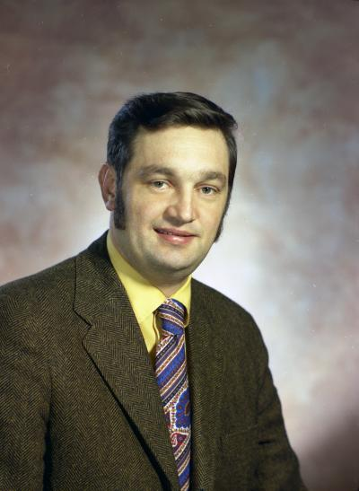 Representative Dan Van Dyk, 1971